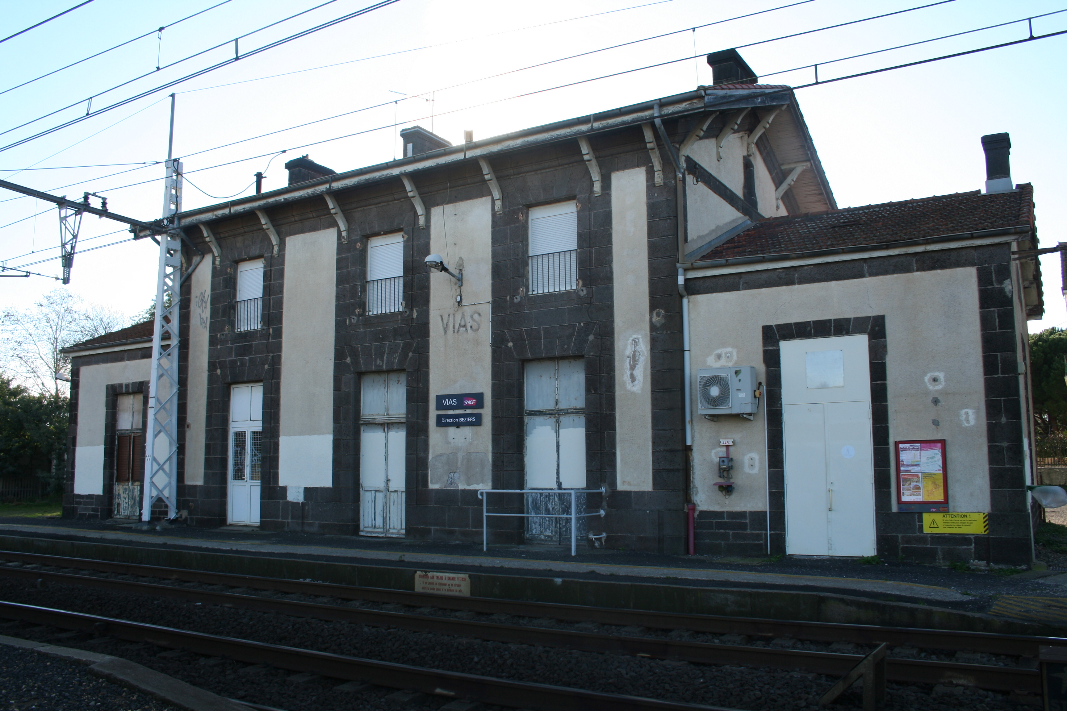 Vias (Hérault) - gare de Vias.